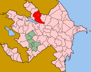 Map of Azerbaijan showing Shaki (Şəki) rayon.